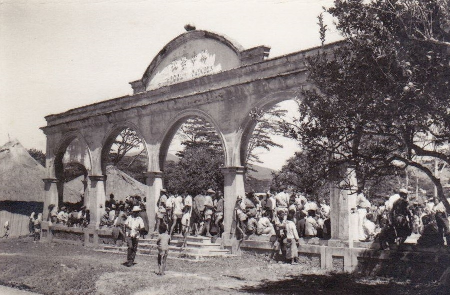 Restos da escola chinesa de Aileu em Jun 1970